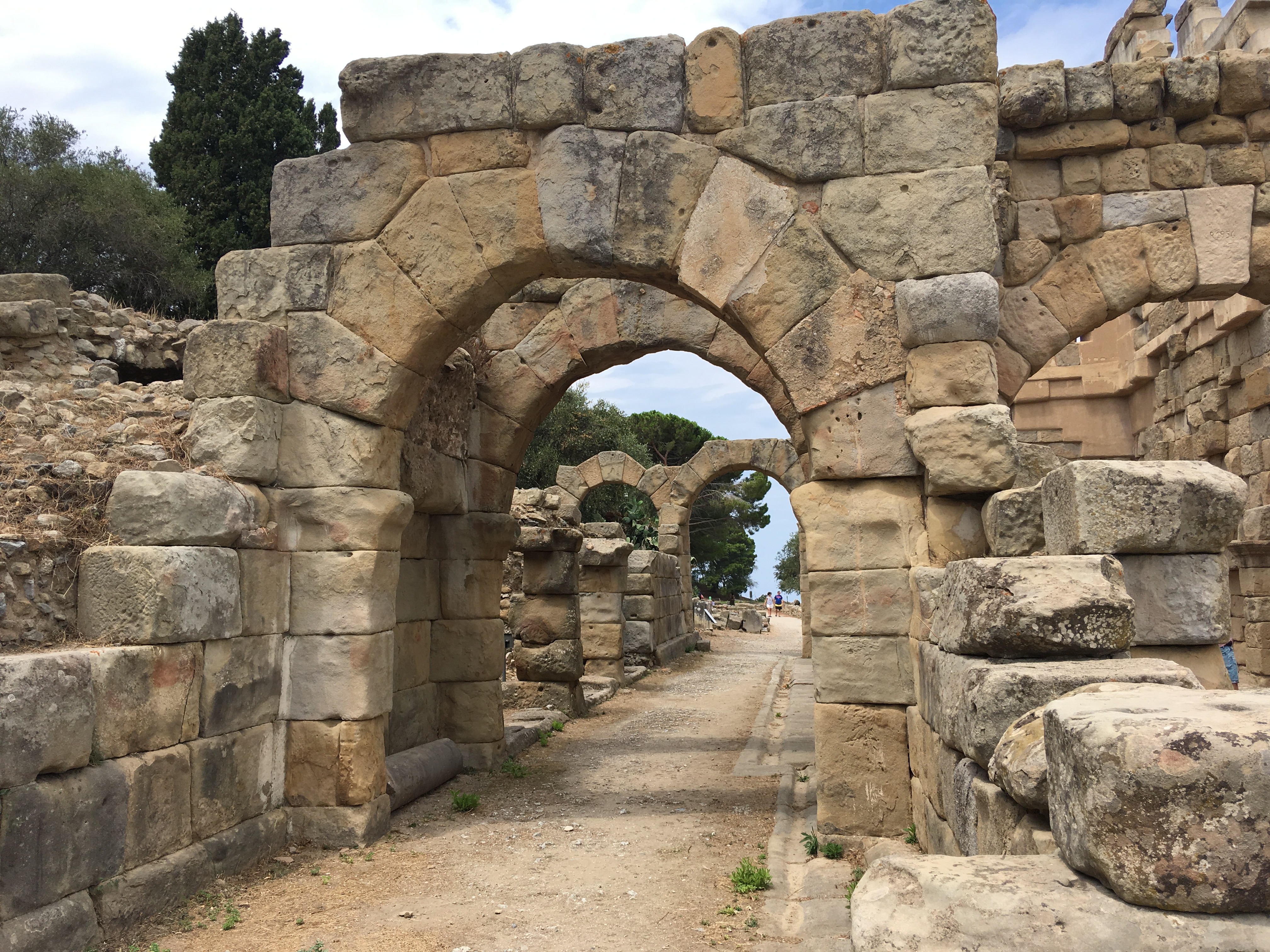 Arco a tutto sesto della vecchia città greco romana di Tindari